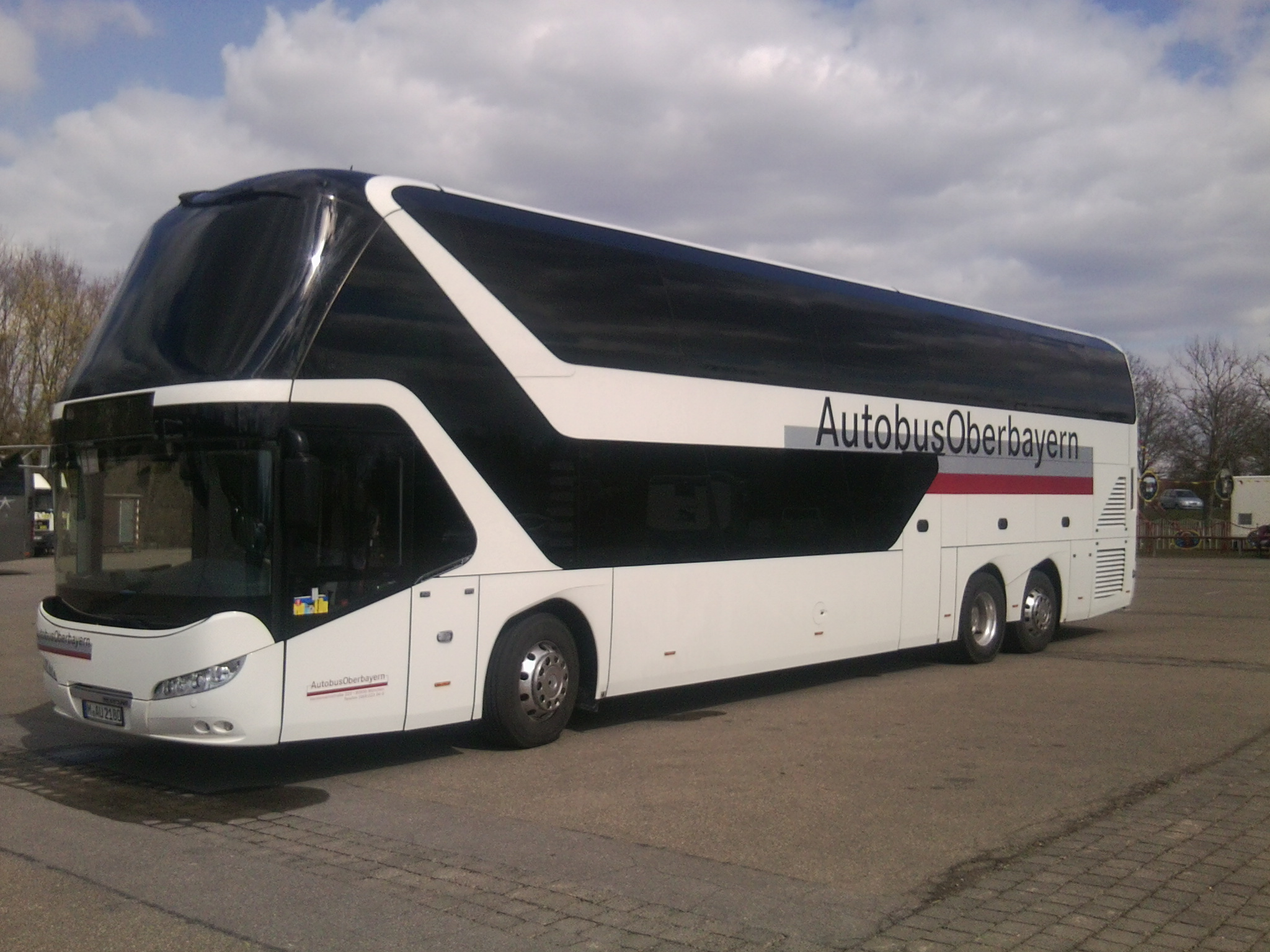 Neoplan Skyliner 2011 Autobus Oberbayern